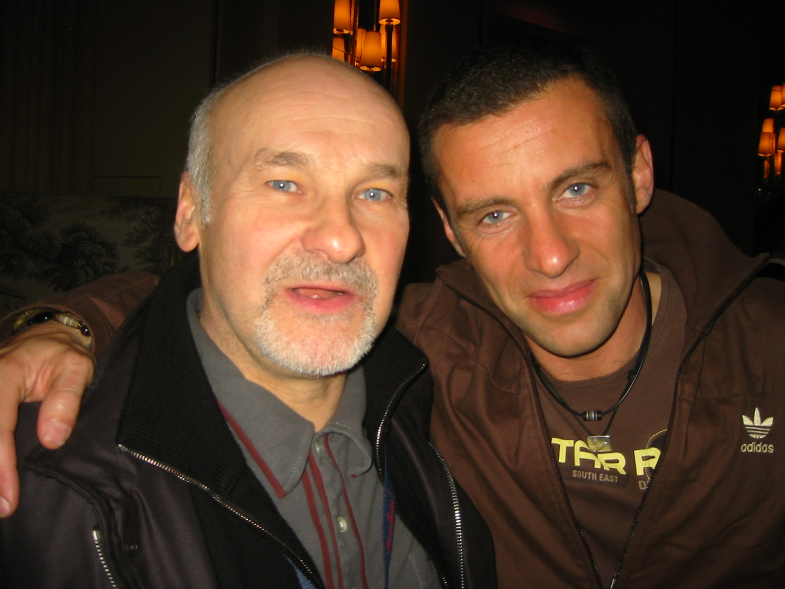 Martin Schmitt und Paul Carrack (Sänger von Mike and the Mechanics)